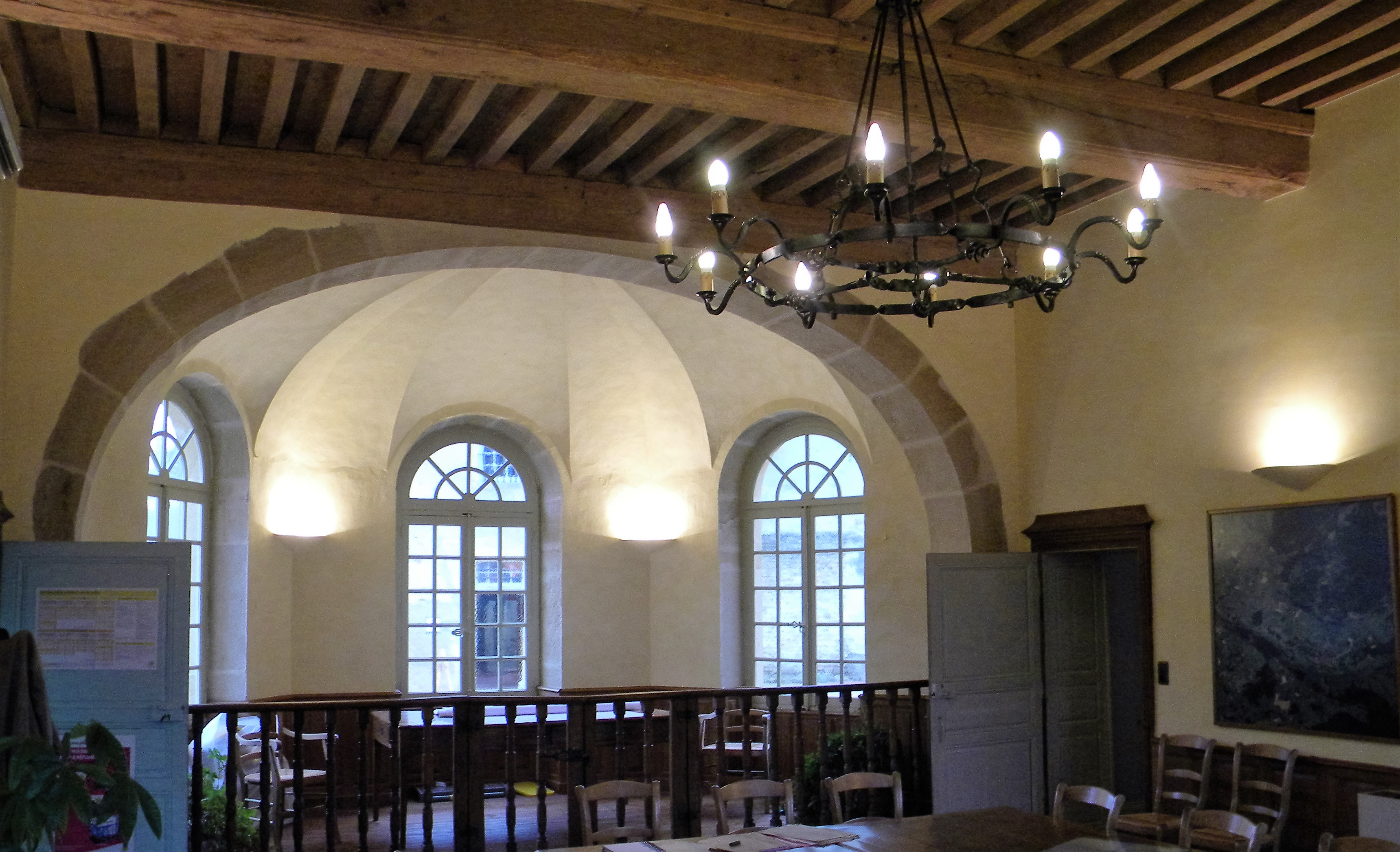 Vue de la salle principale qui était la salle d'audience de l'auditoire de justice